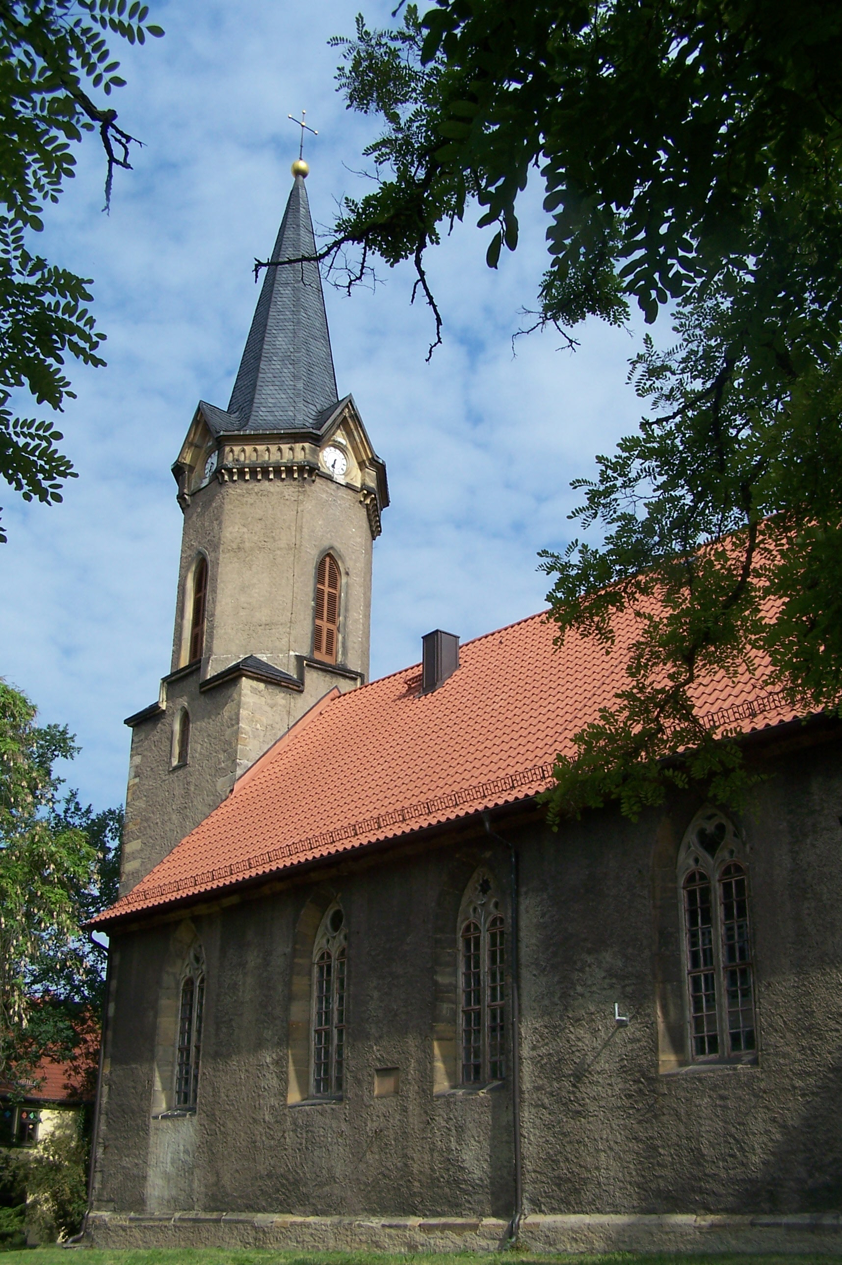 An der Trinitatiskirche Wangenheim.